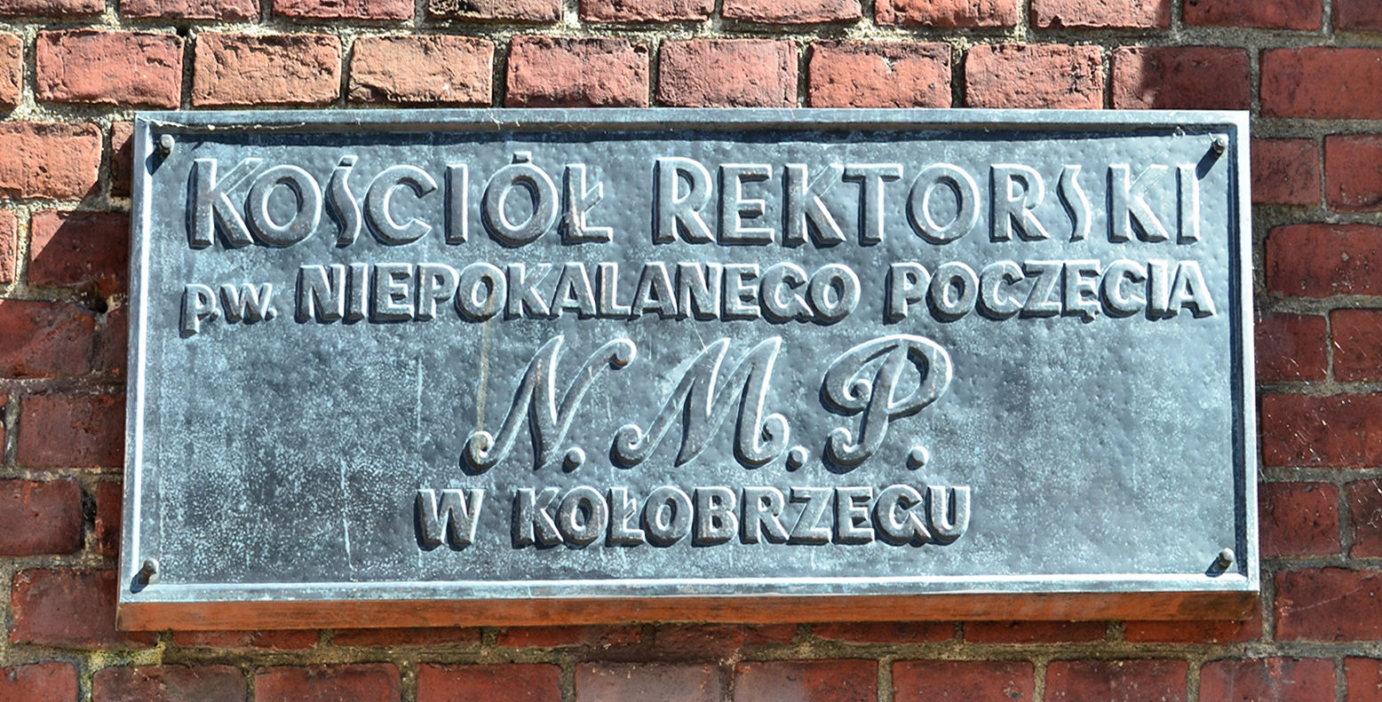 Kościół Rektorski w Kołobrzegu